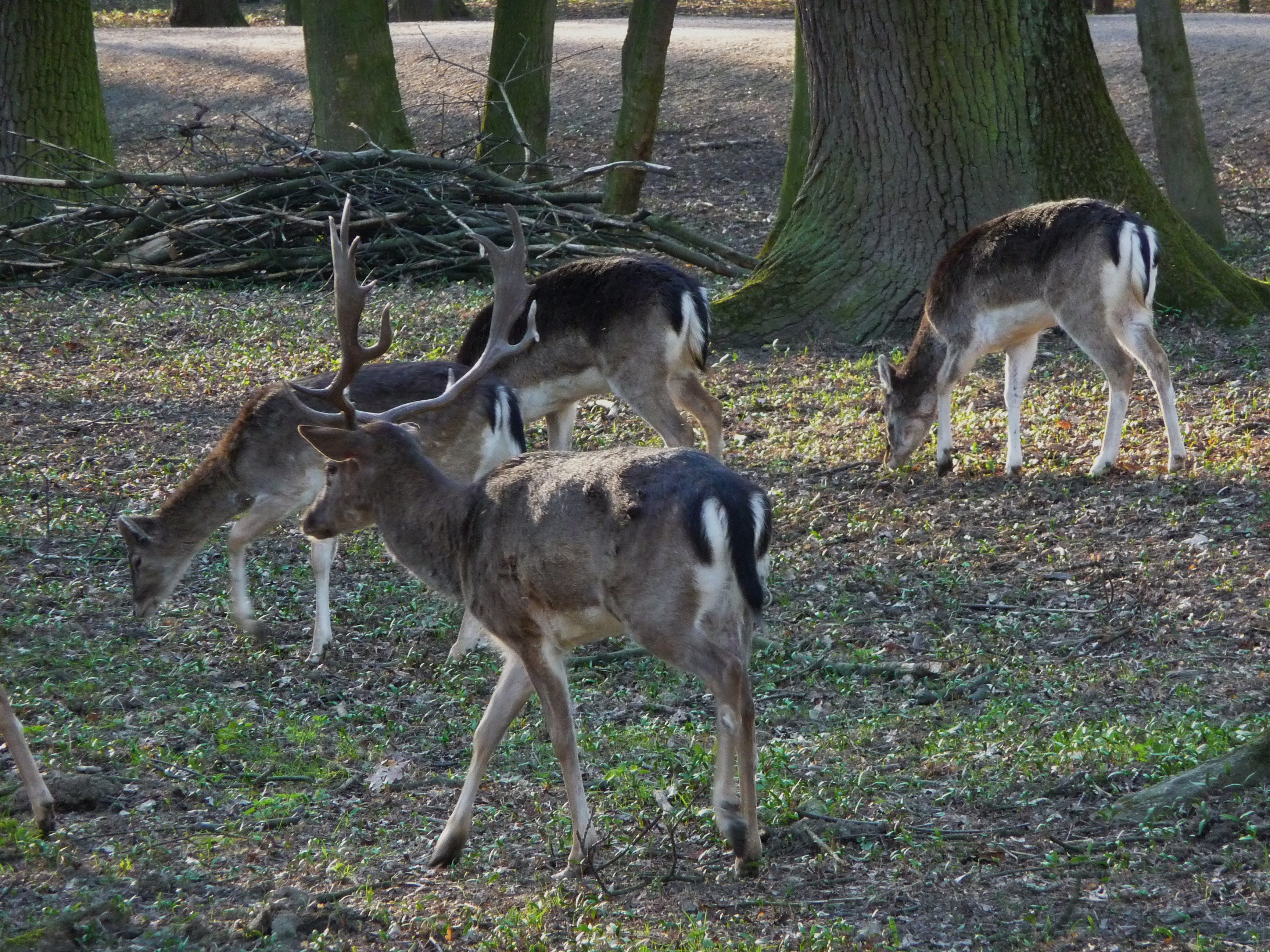 Gruppe Damhirsche (Dama dama) im Fellwechsel, fotografiert im Wildpark Ludwigshafen-Rheingönnheim (Rheinland-Pfalz, Deutschland)